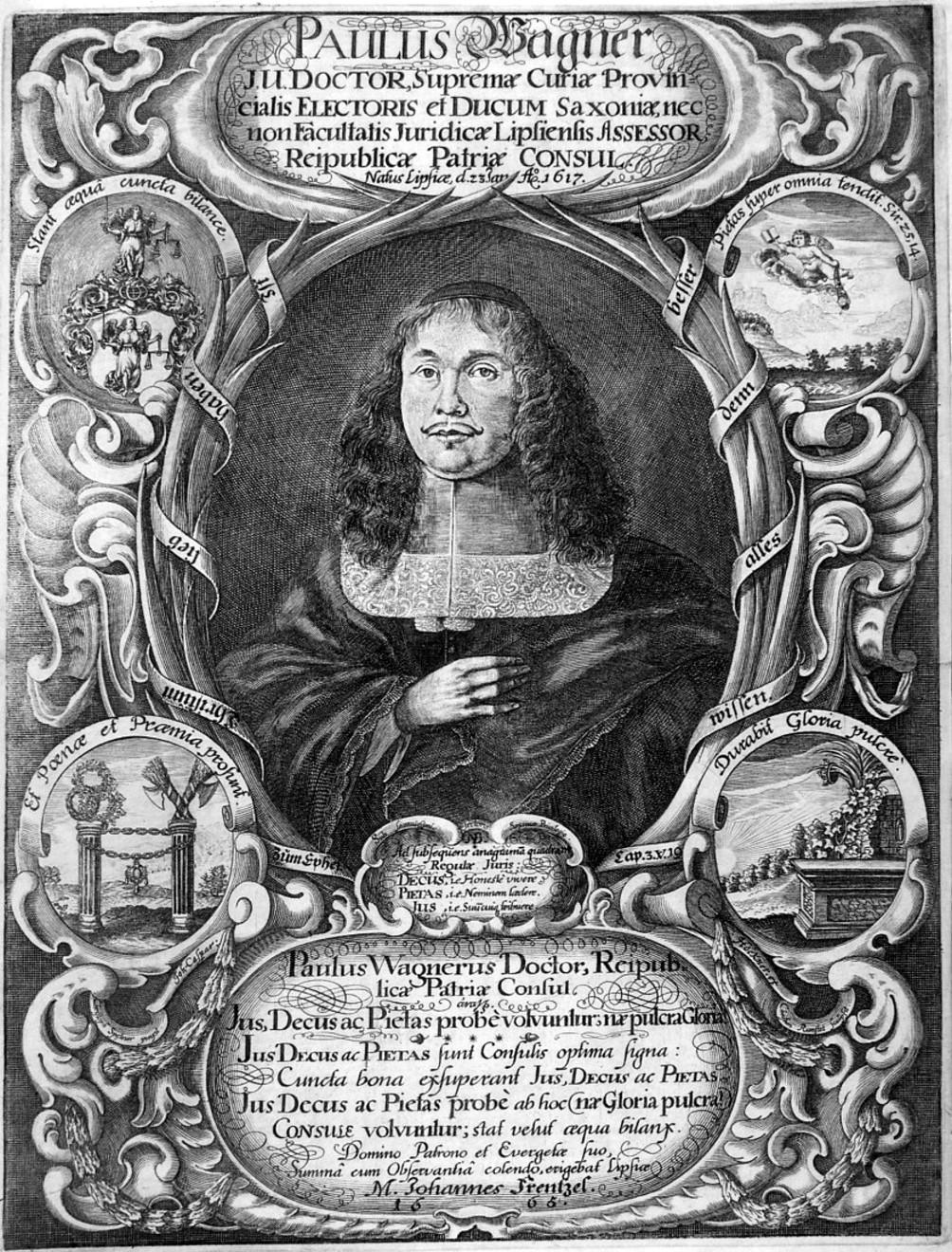 Paul Wagner (1617–1697), kursächsischer Jurist und Bürgermeister der Stadt Leipzig; Kupferstich von Johann Caspar Höckner und Christian Romstet nach Christoph Spetner, 28,5 x 21,5 cm, Allgemeiner Porträt-Katalog, Nr. 27331